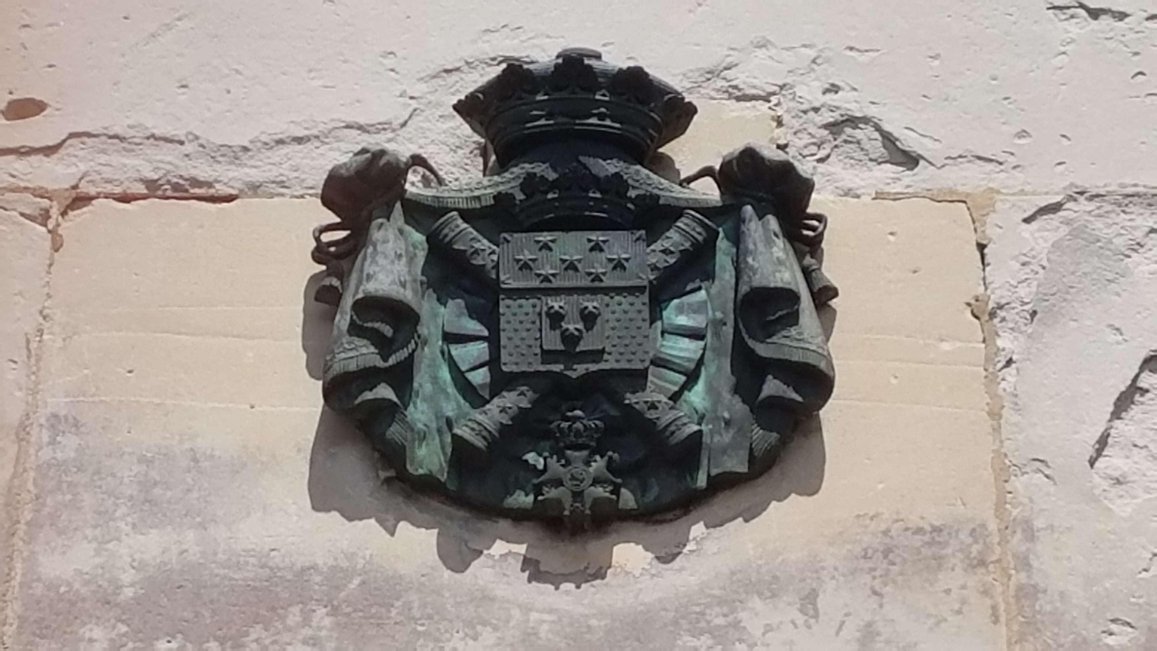 Armoiries de bronze présentes sur le tombeau du Maréchal Soult.